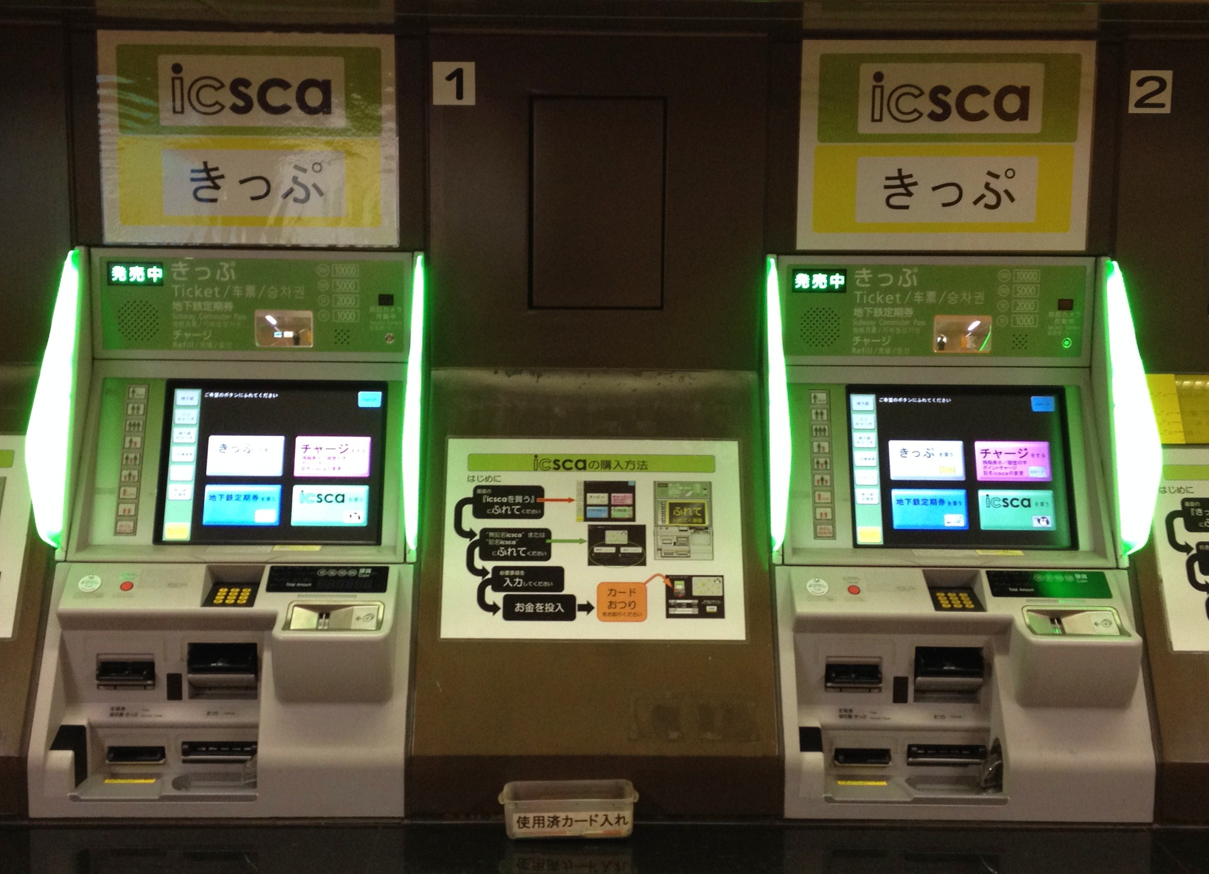 icsca対応の自動券売機（北仙台駅）